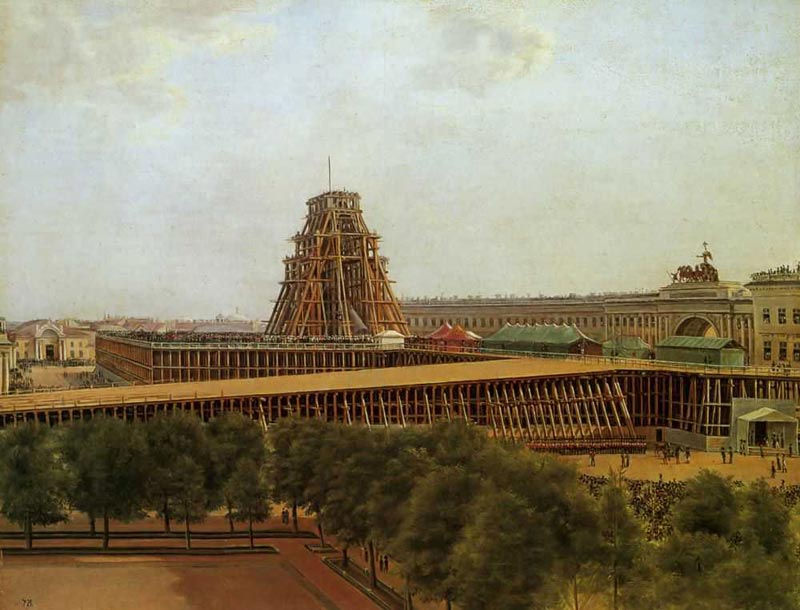 Подъем Александровской колонны, 1832